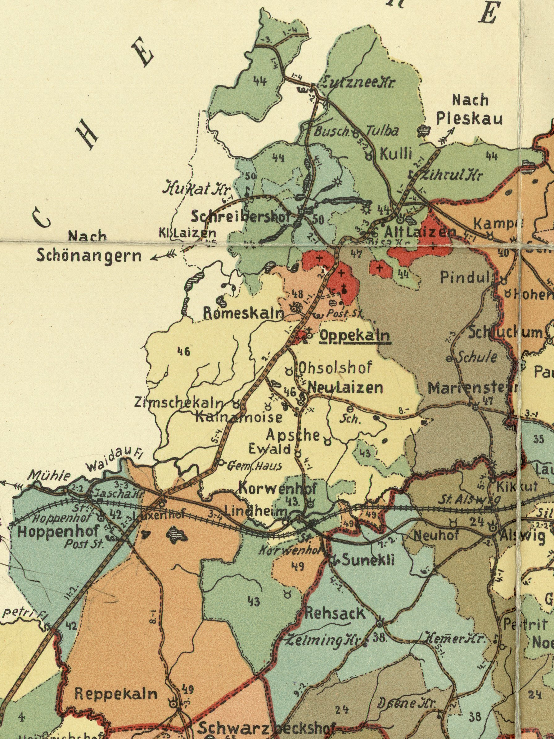 Apekalnsi kihelkonna mõisad 1904. aasta kaardil.